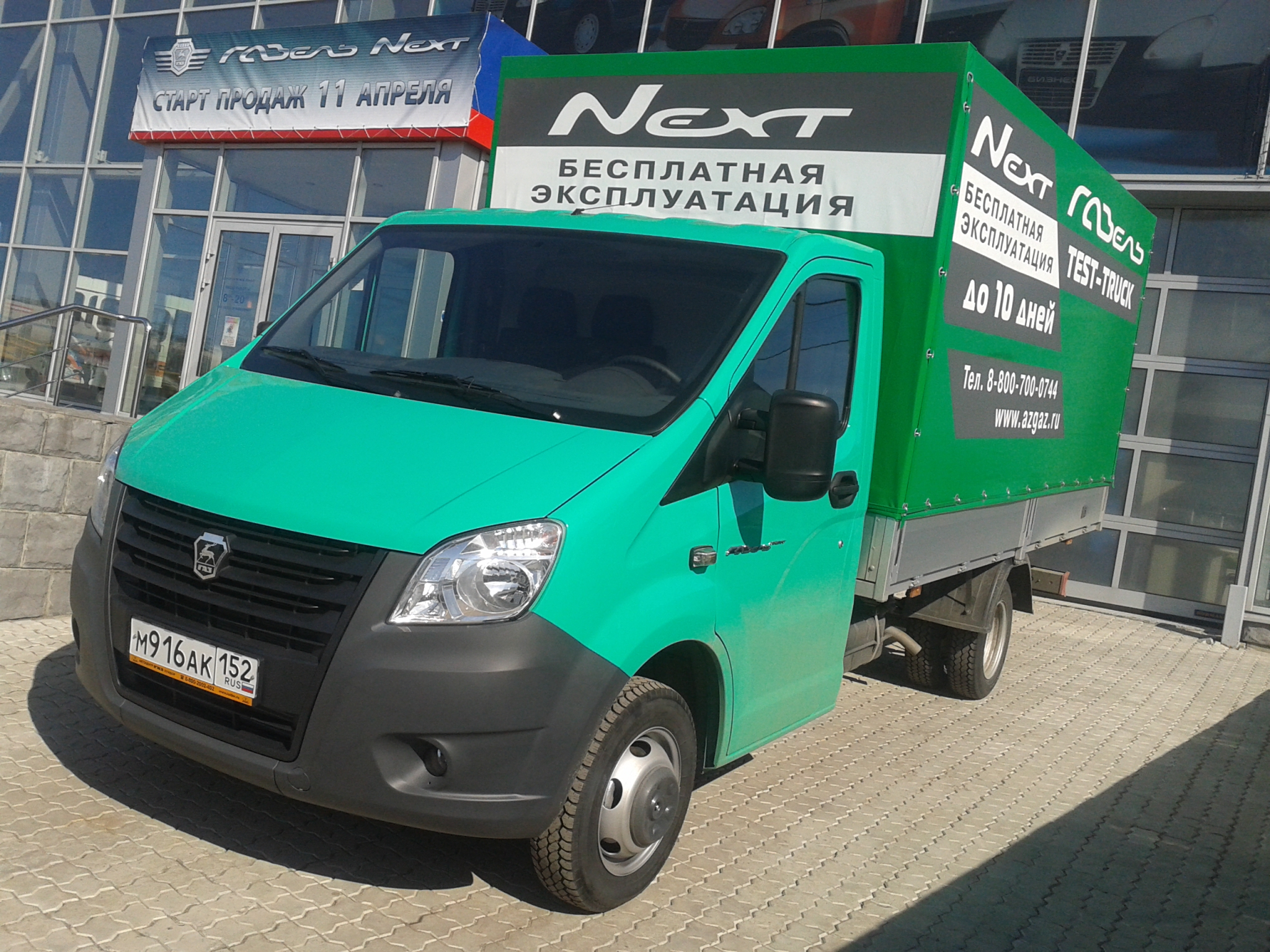 Начало продаж Газель-Некст в Нижнем Новгороде. Грузовик для тестовой эксплуатации.